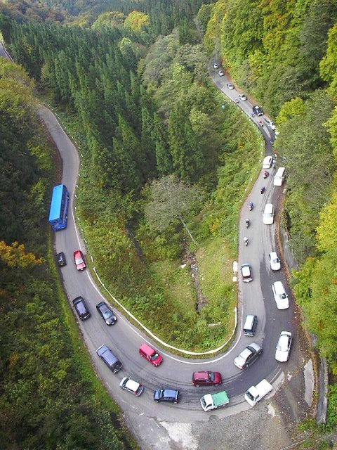 大湯道路 開通前の旧道の混雑状況